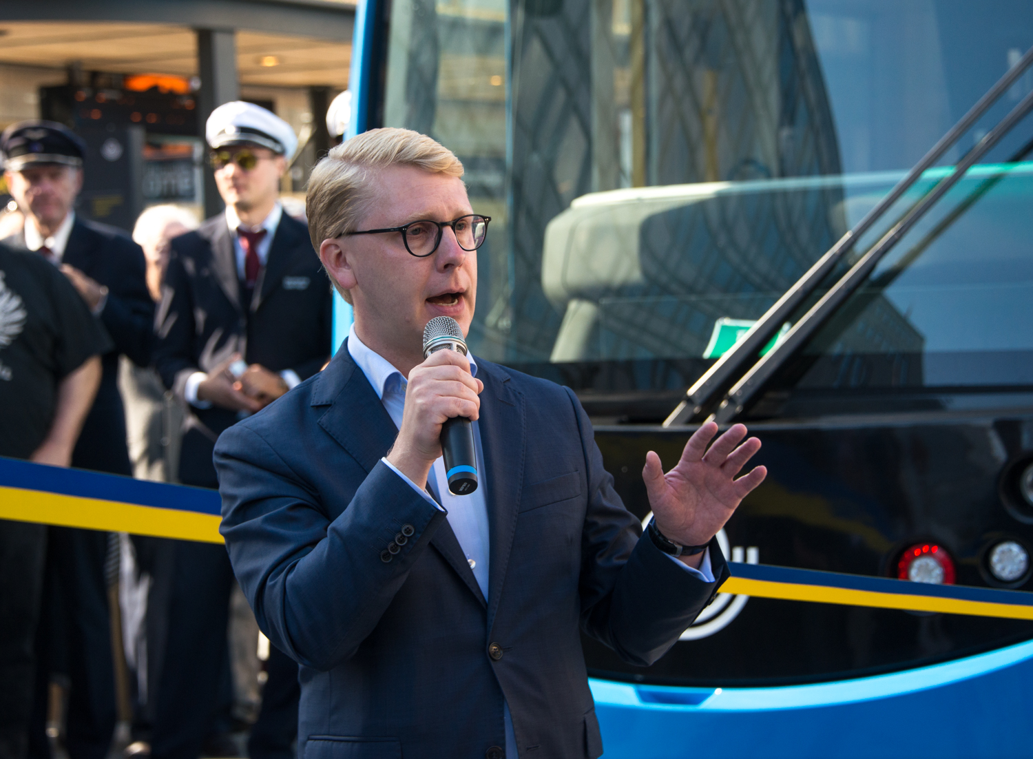 Kristoffer Tamsons vid invigningen av Spårväg Citys nya hållplats vid Klarabergsgatan och därmed förlängning av linjen fram till T-centralen. Den nya hållplatsen T-Centralen blir ny start- och sluthållplats för Spårväg City mot Djurgården.